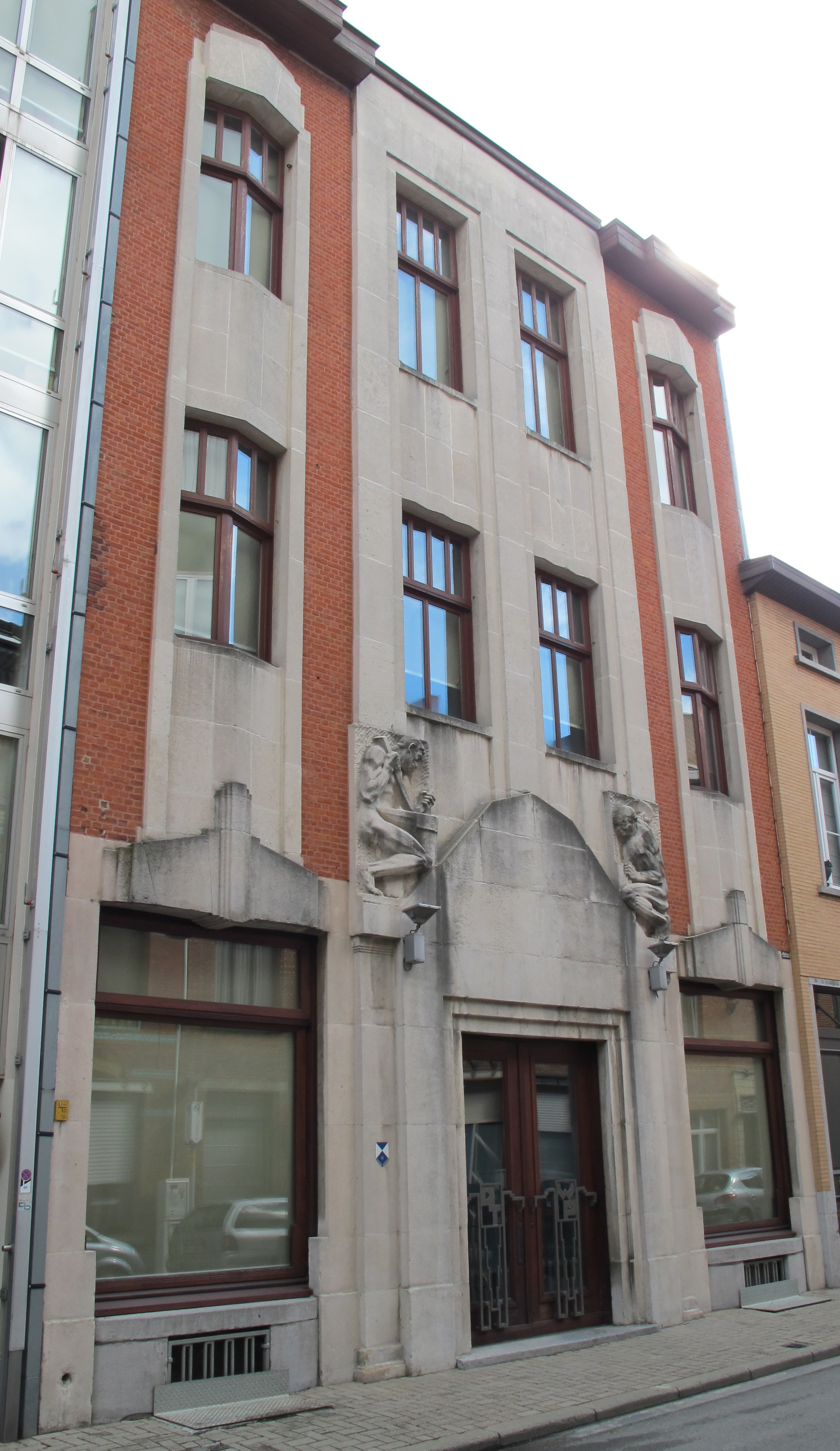 't Volkshuis, gebouw art-decostijl naar ontwerp van R. Soebert, Vermorgenstraat 9, Sint-Niklaas